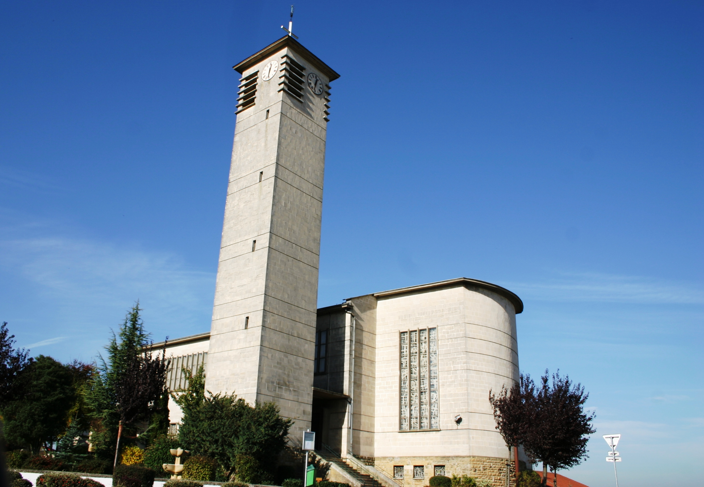 Kierch vu Roussy-le-Village am Oktober 2006. Roussy-le-Bourg Roussy-le-Bourg